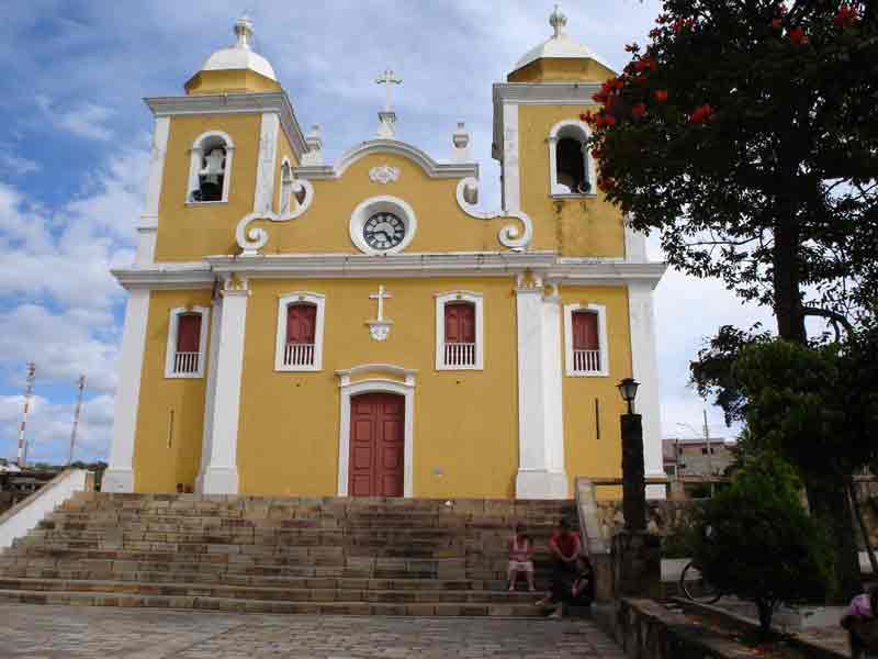 This image was copied from pt. The original description was: Cidade de São Thomé das Letras-MG. Igreja da praça central. Foto retirada por mim em visita à cidade em 22/01/2006.